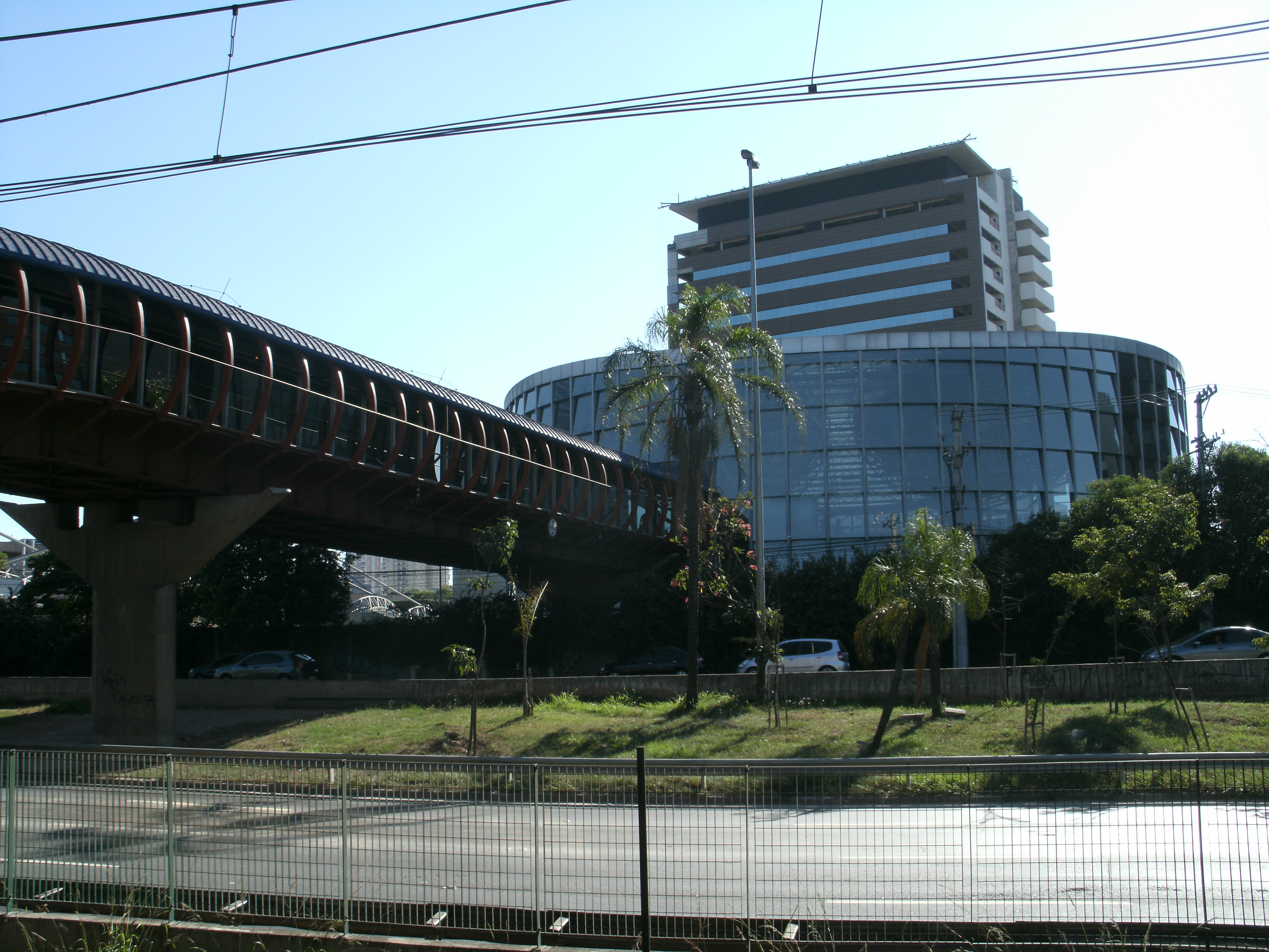 Estação Pinheiros do Metrô - vista da Estação Pinheiros da CPTM